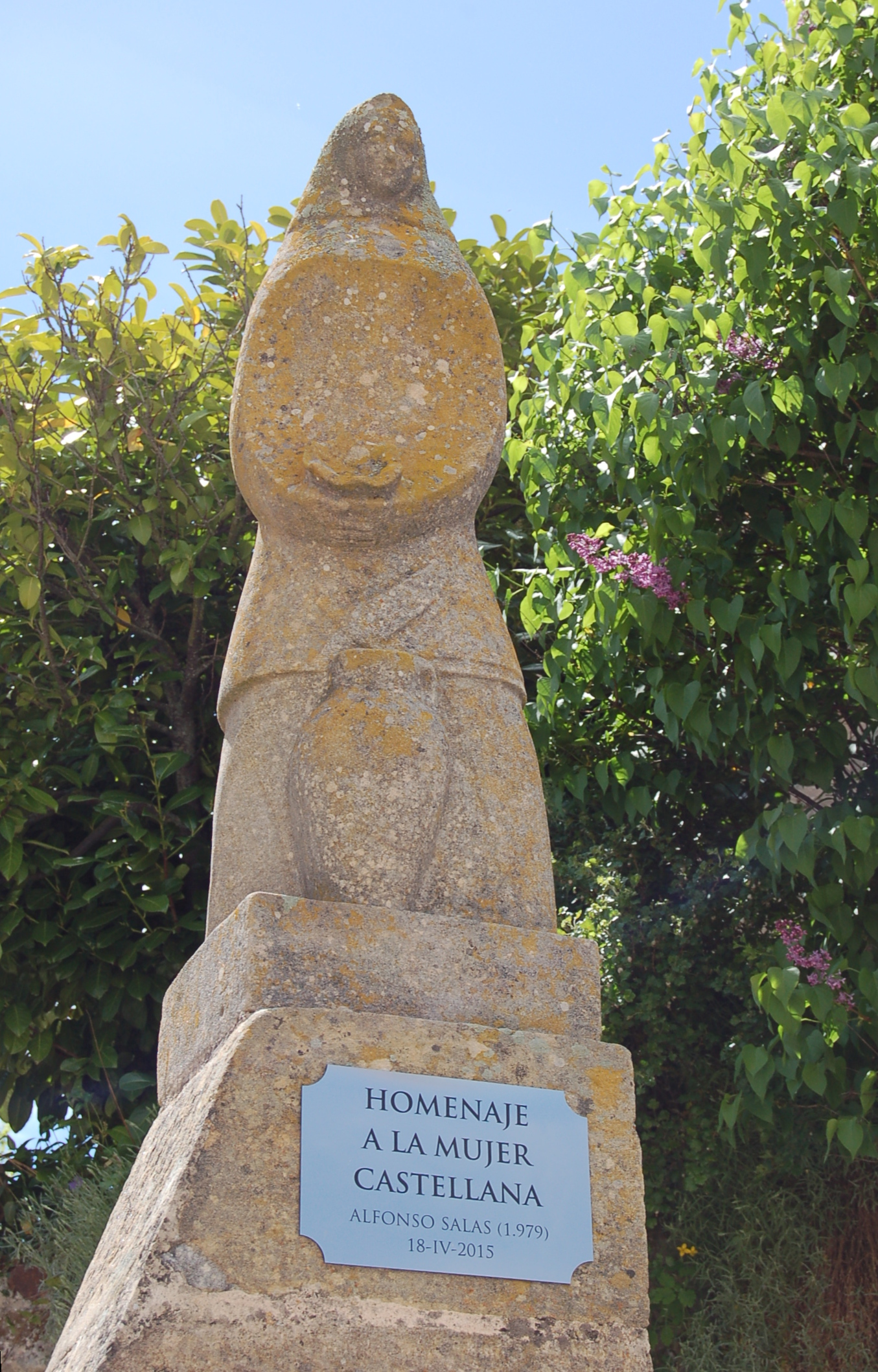 Escultura homenaje a la mujer castellana en Castrillo de la Reina, obra de Alfonso Salas